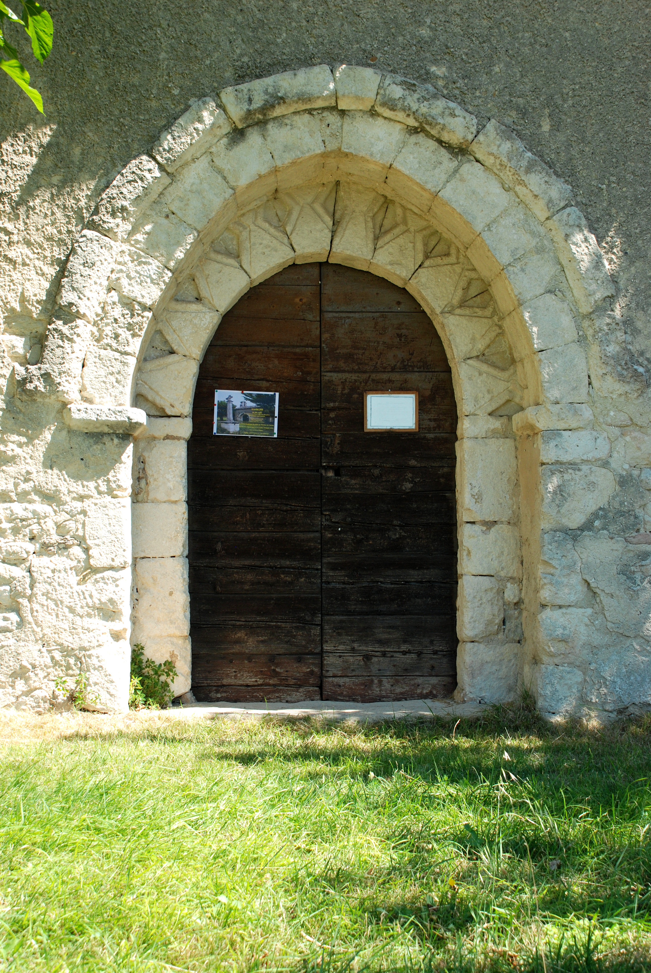 France - Drôme - Chapelle des Barquets